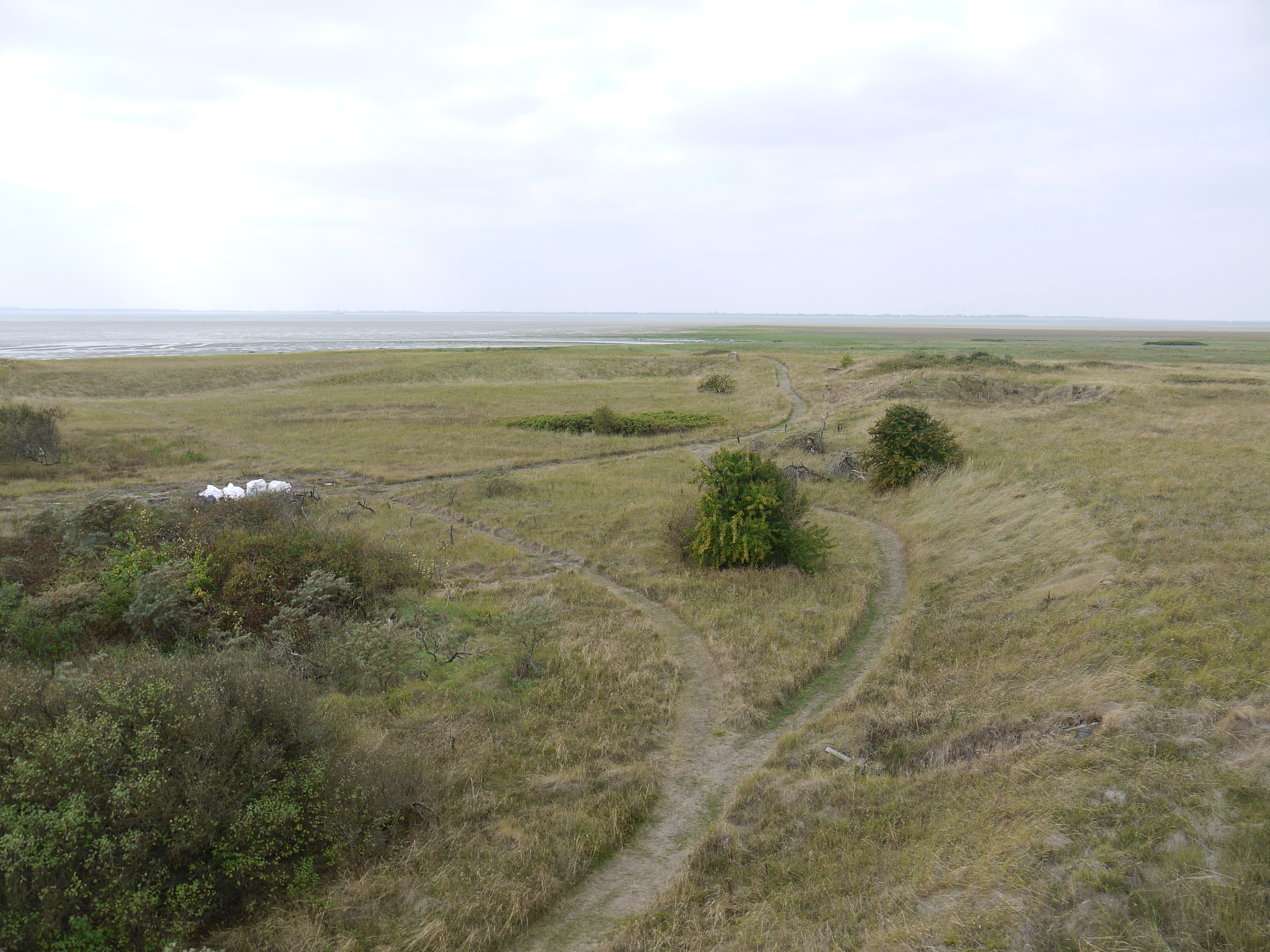 Ringdeich Mellum Innenseite